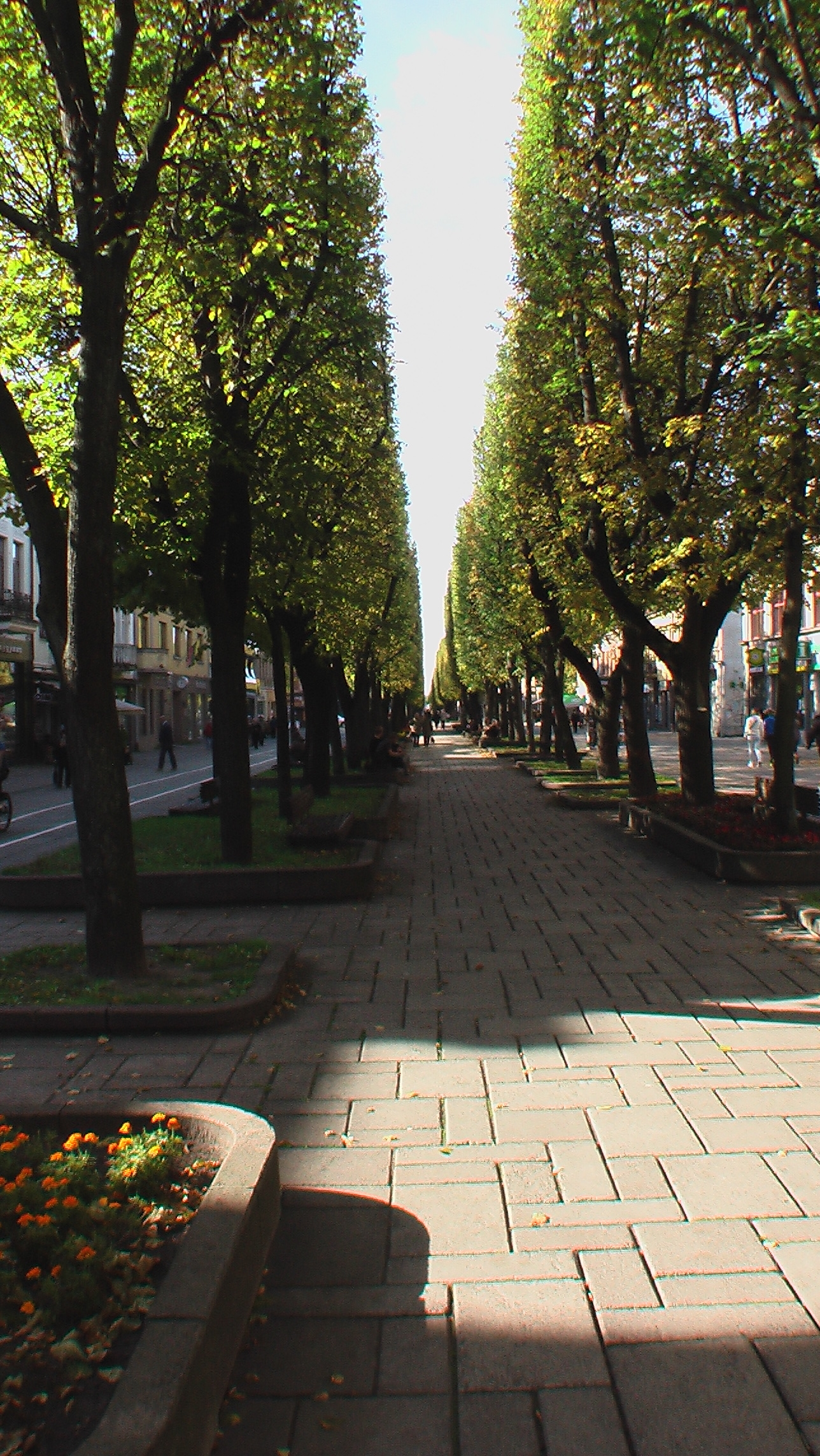 Laisves aleja in Kaunas.